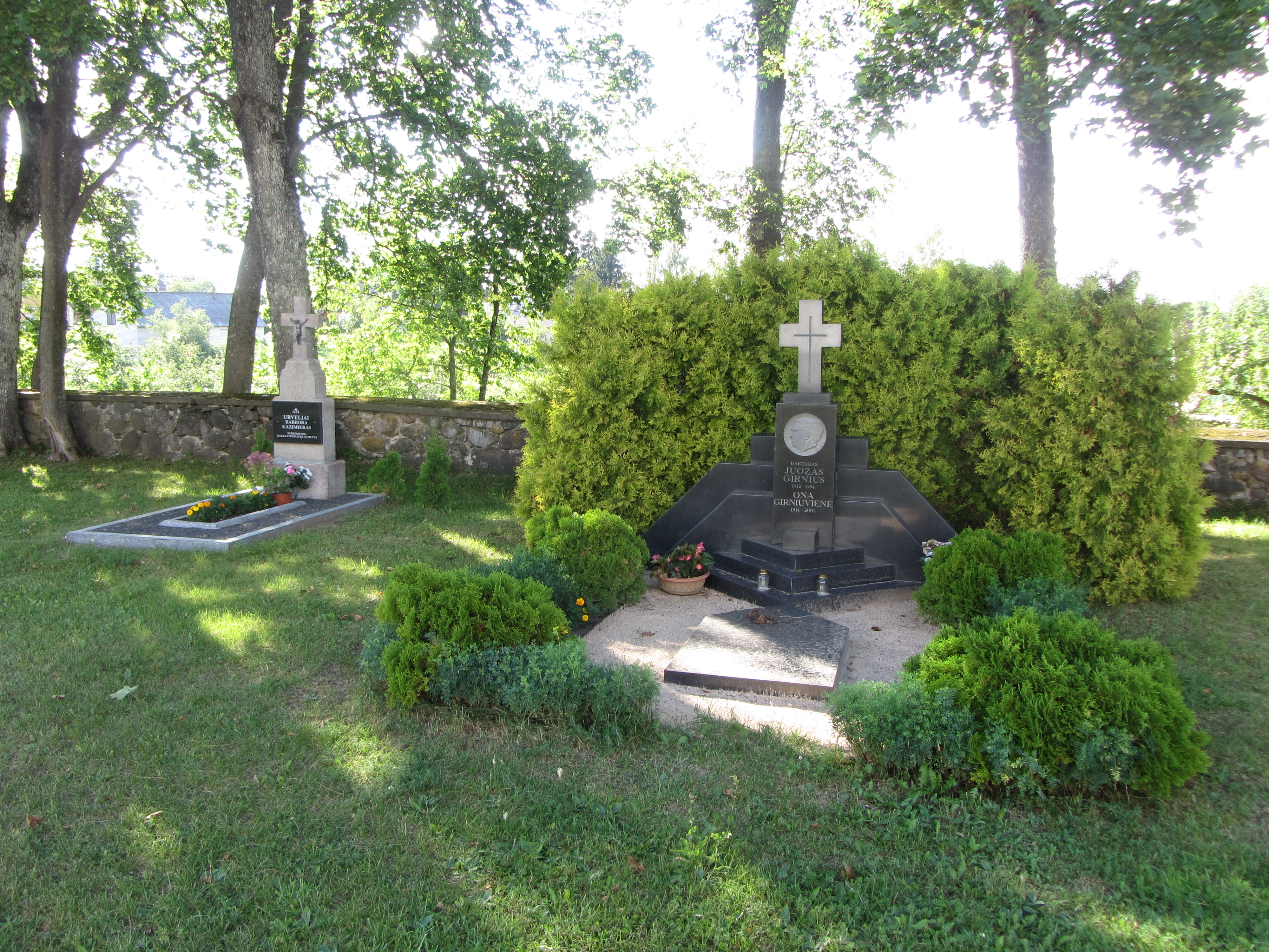 Sudeikiai, Lithuania